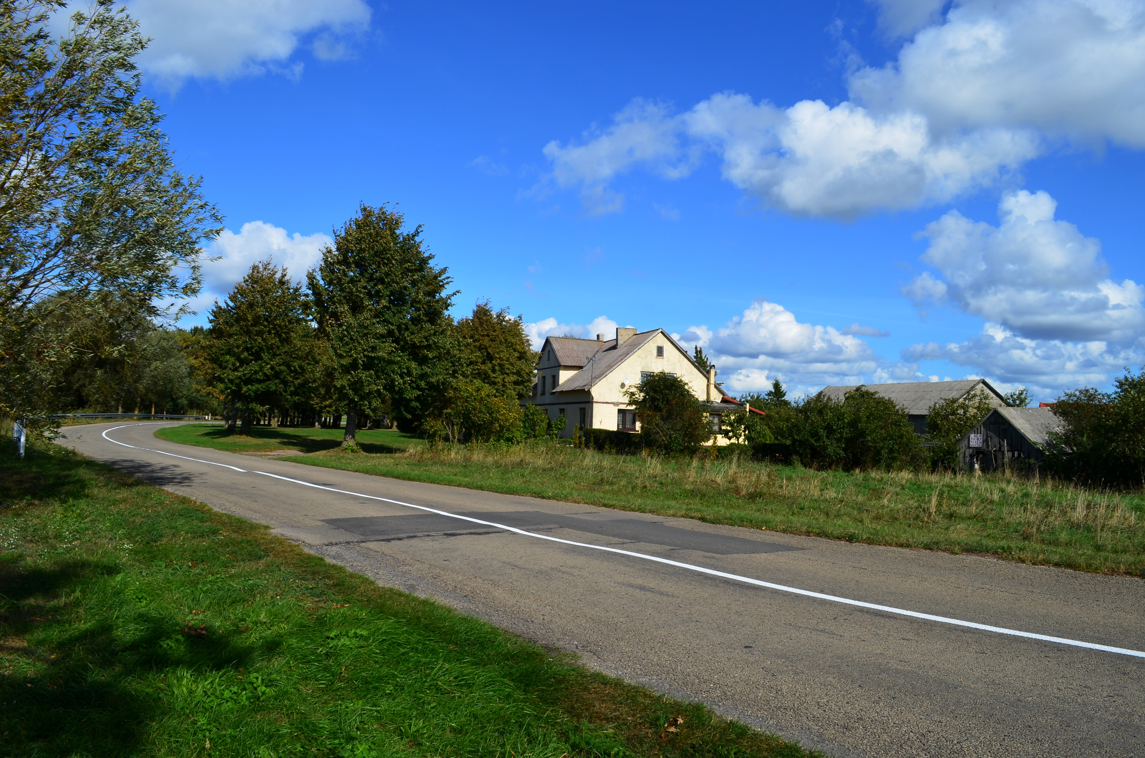 Žemaitėška: Vėntė, Šėlotės rajuons